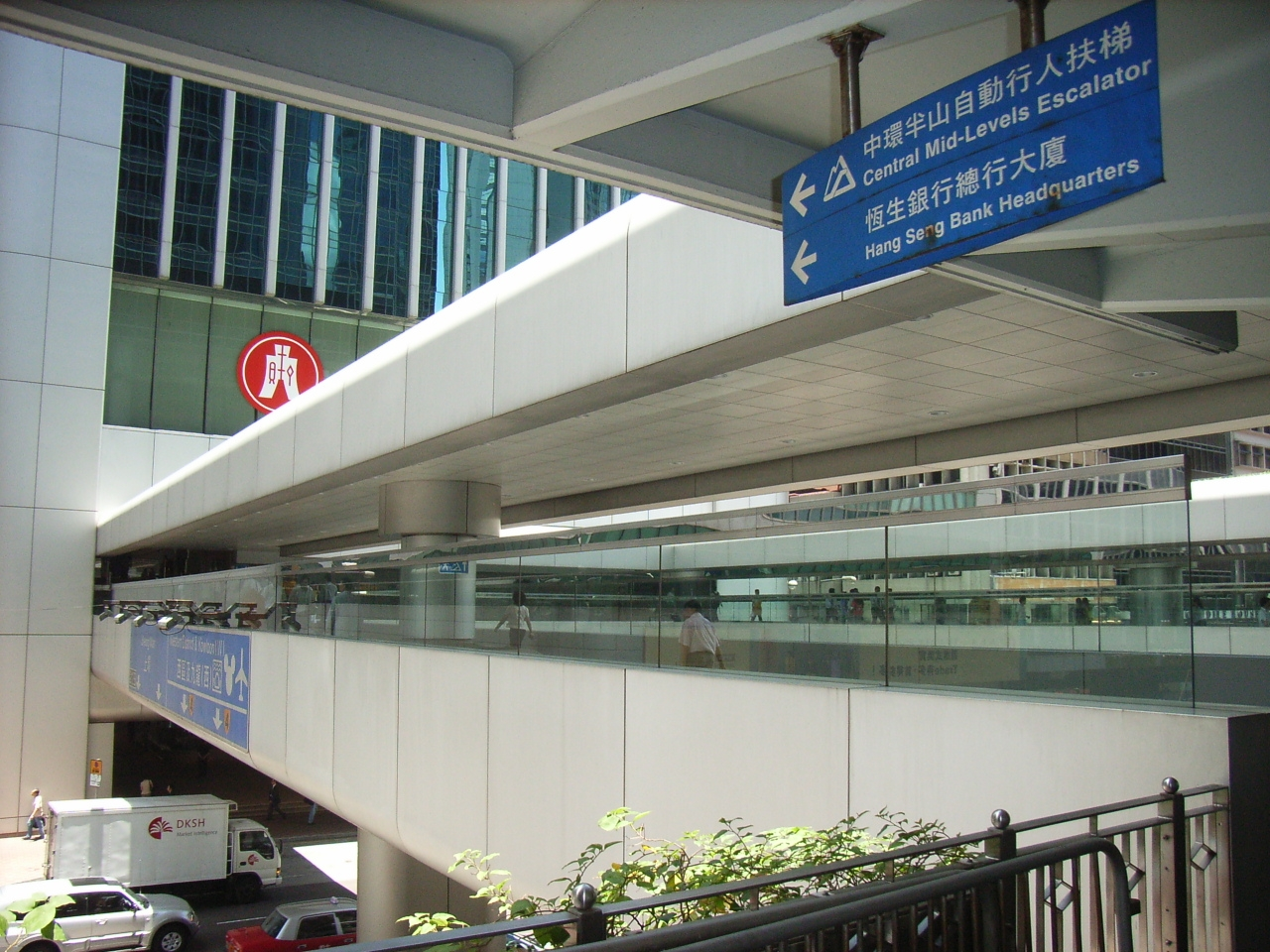 1993年啟用的"中環至半山自動扶梯系統"，經"恒生銀行總行"，連接至"中區行人天橋系統". By KennethTom